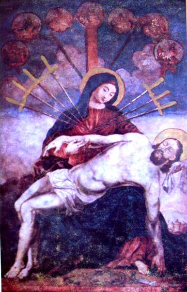 Картина "Семь ран Богоматери", Эчмиадзин, XVII века